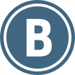 京福電気鉄道北野線の路線記号。DejaVu Sansフォントを使用して作成